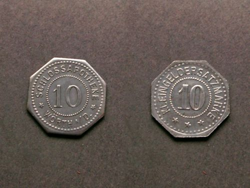 Schlossapotheke Wörth an der Donau Kleingeldersatz